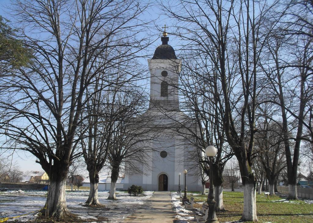 Храм СПЦ Рођења Пресвете Богородице у Богатићу, Мачва, Србија